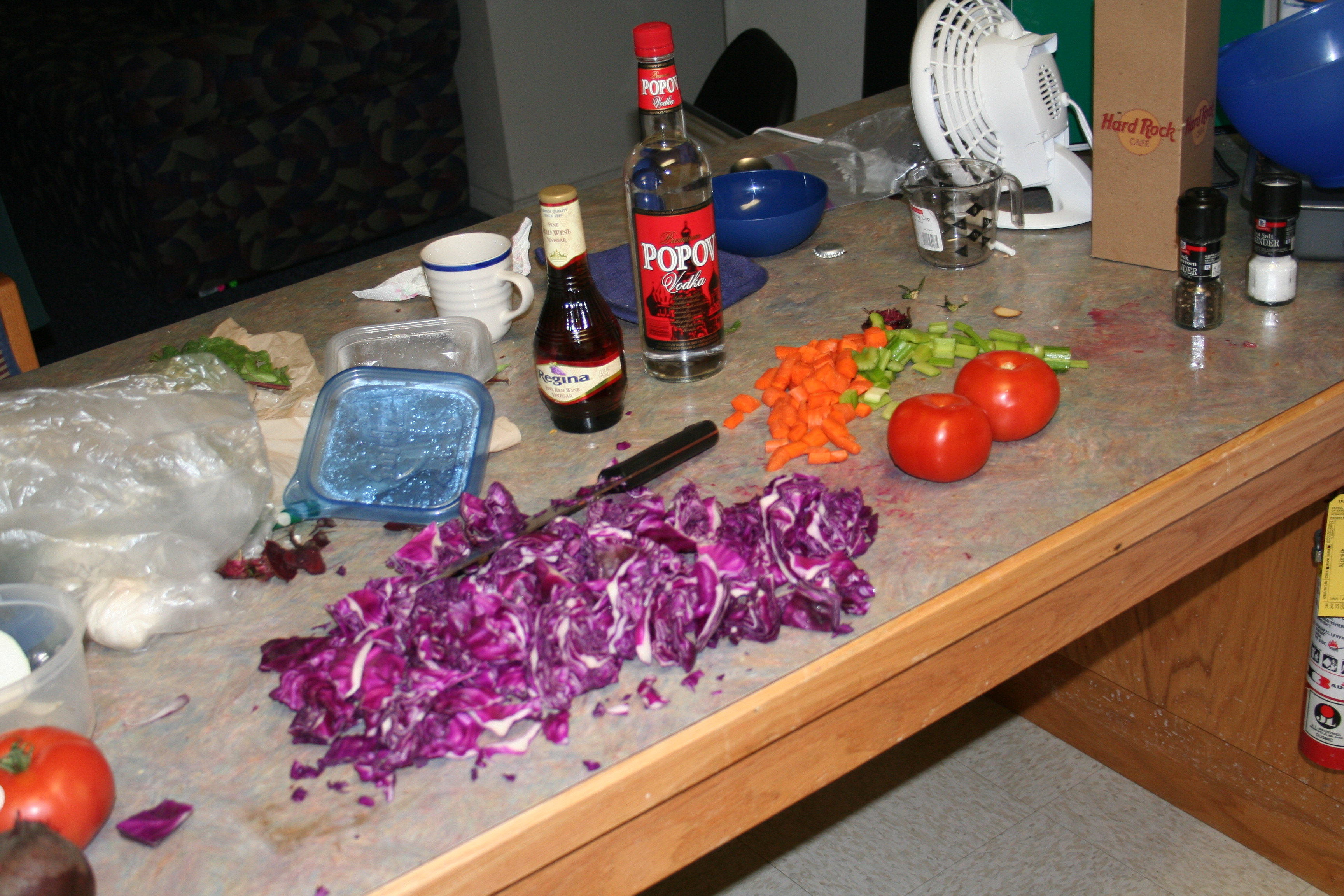 Ingredientes del Borscht antes de la preparación.